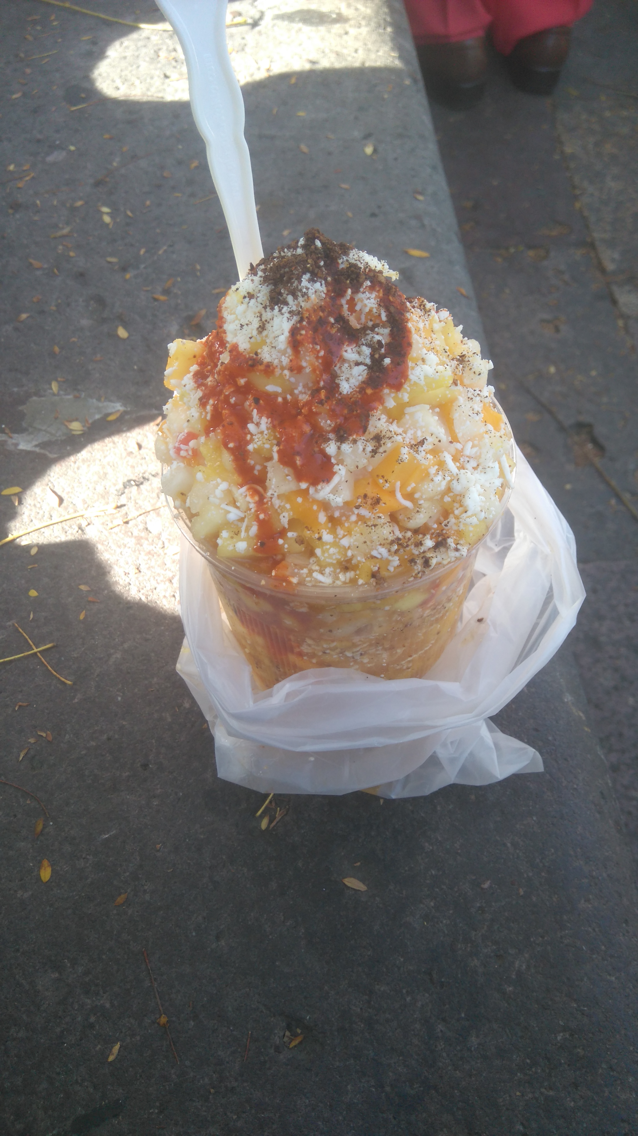 Gazpacho tradicional de Morelia, México